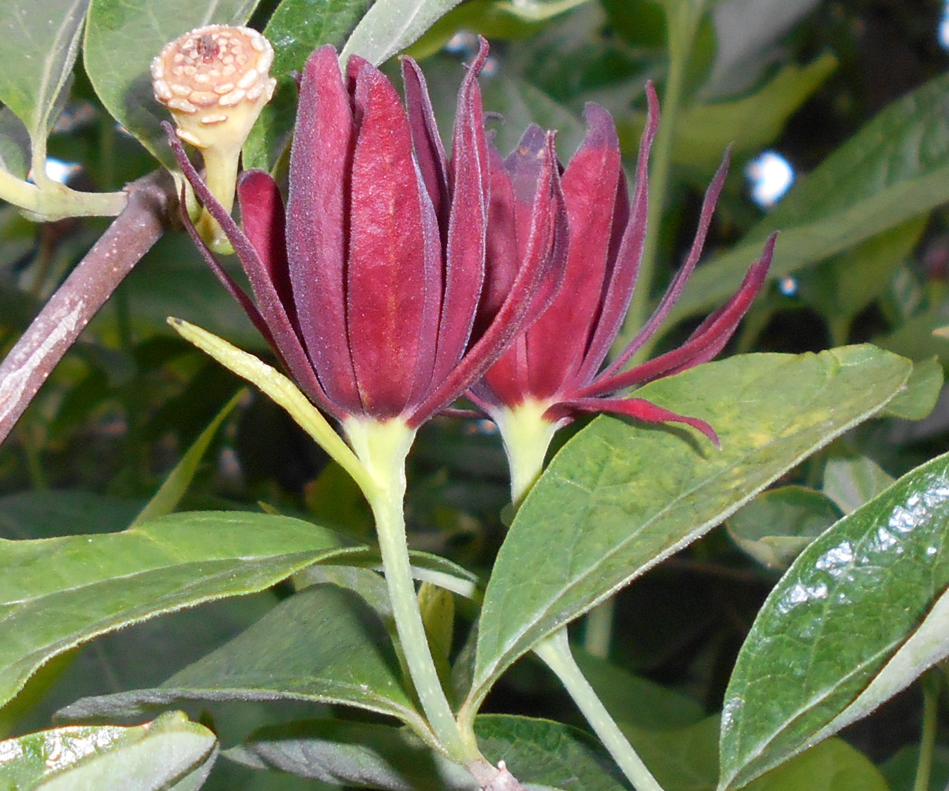 Kielichowiec wonny (Calycanthus floridus), Ogród Botaniczny UMCS w Lublinie